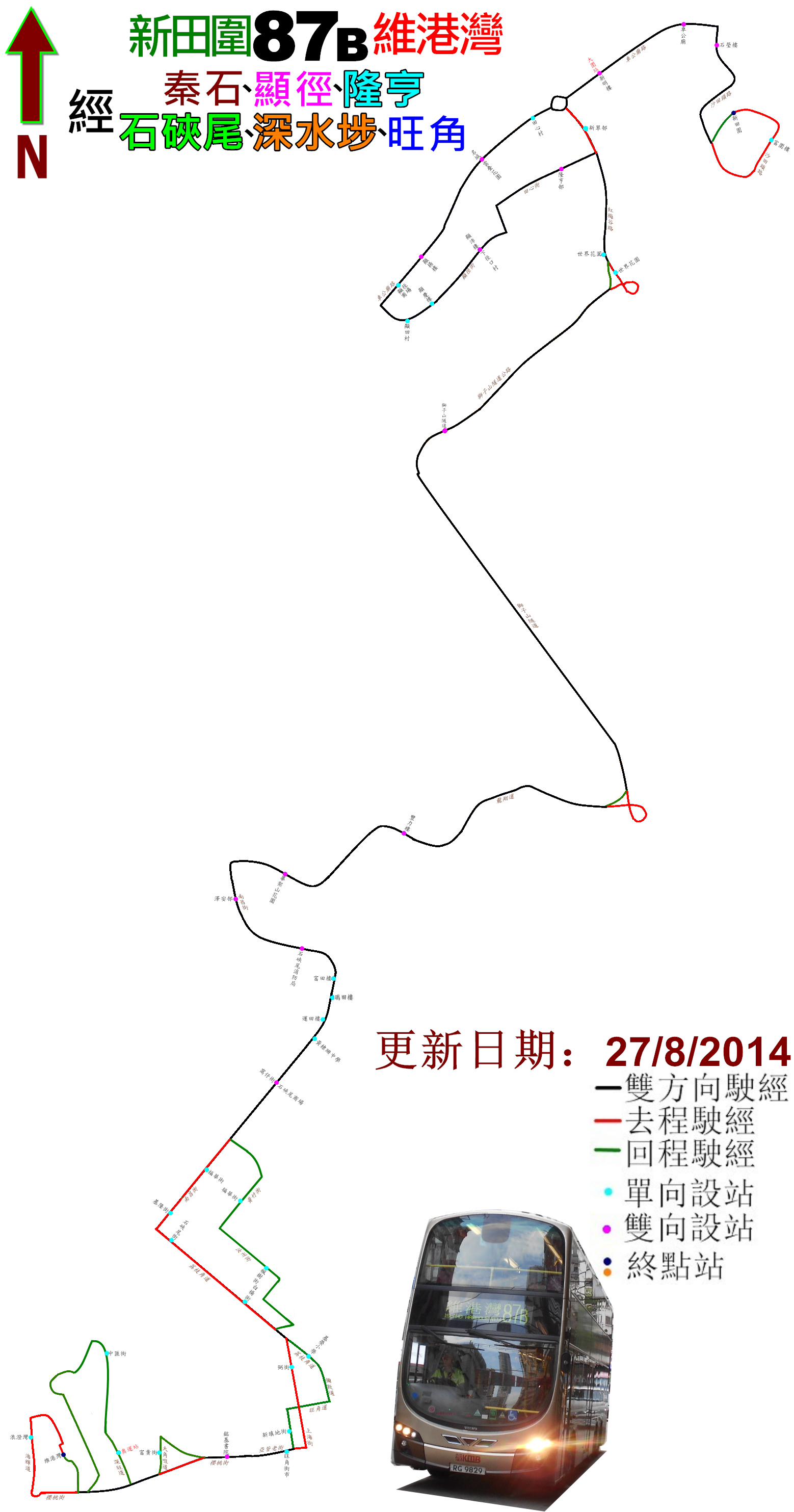 中文（香港）: 九巴87B線的走線圖